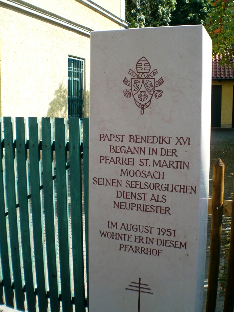 Gedenkstein für Benedikt XVI., München-Moosach